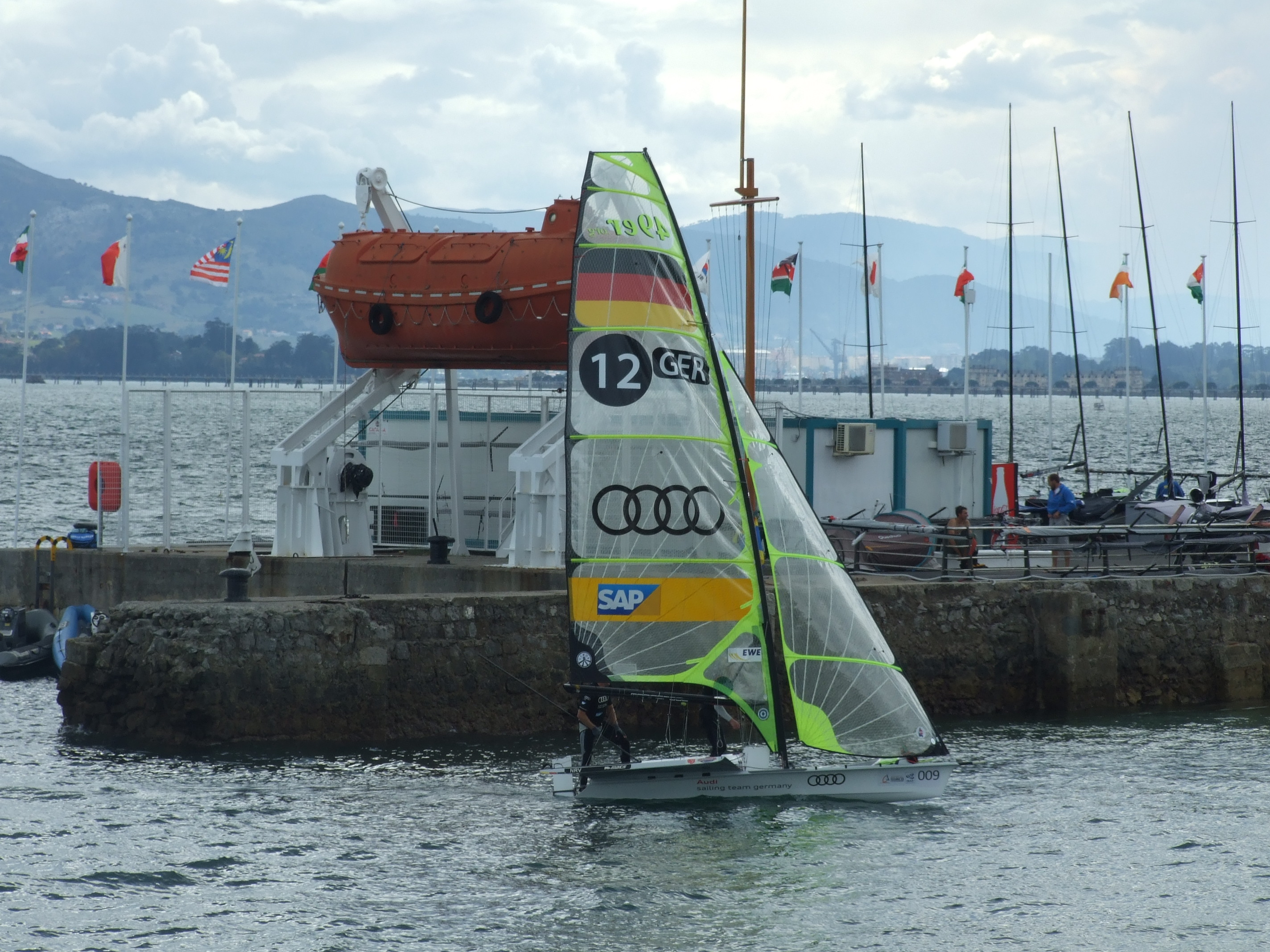 Un 49er llegando a la dársena